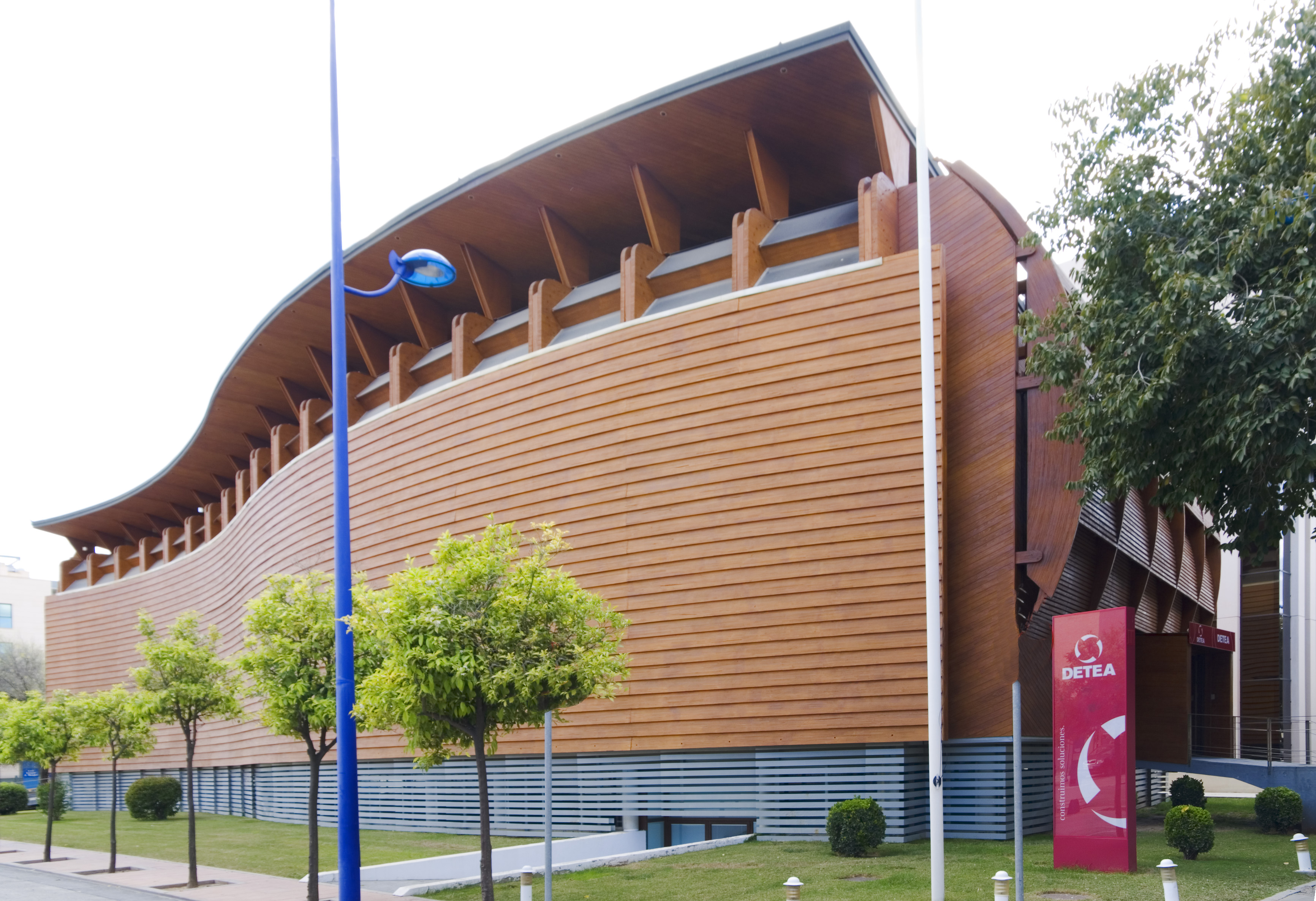 Sede Detea Corporación